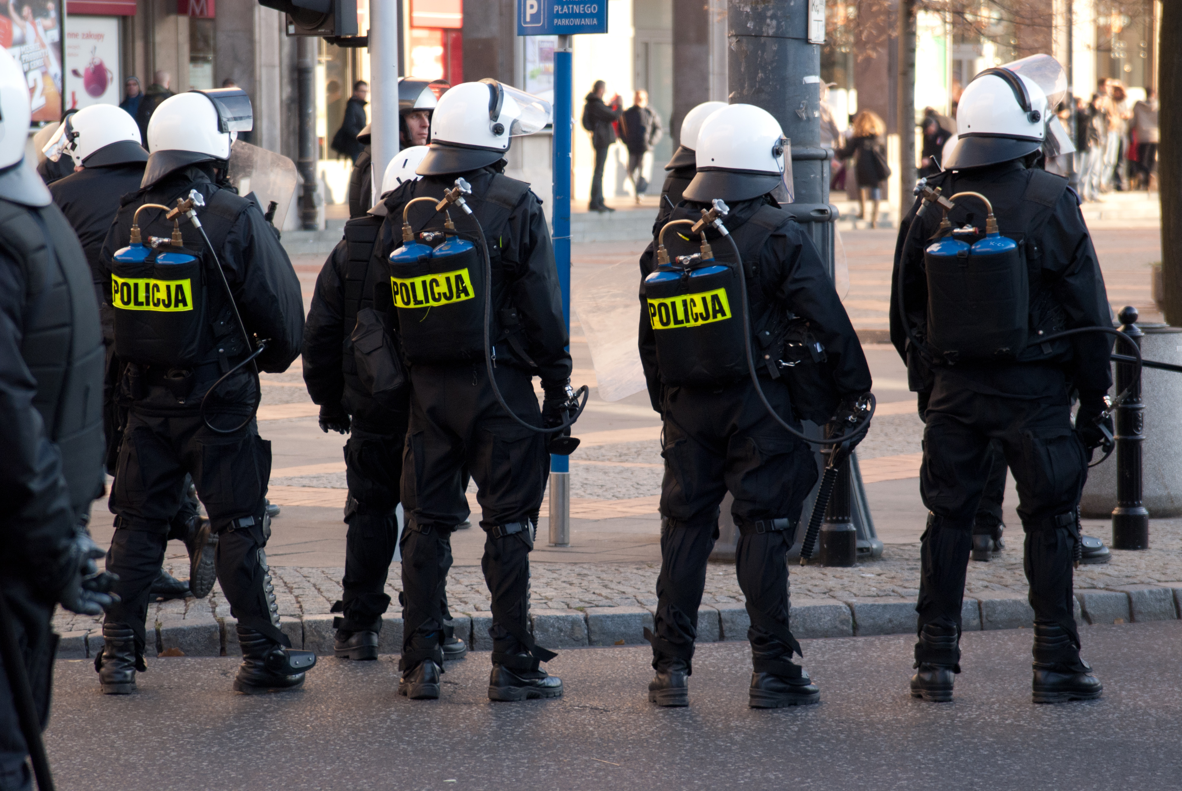 Policjanci z miotaczami gazu łzawiącego na skrzyżowaniu Marszałkowskiej i Pięknej. Warszawa, Marsz Niepodległości 2011